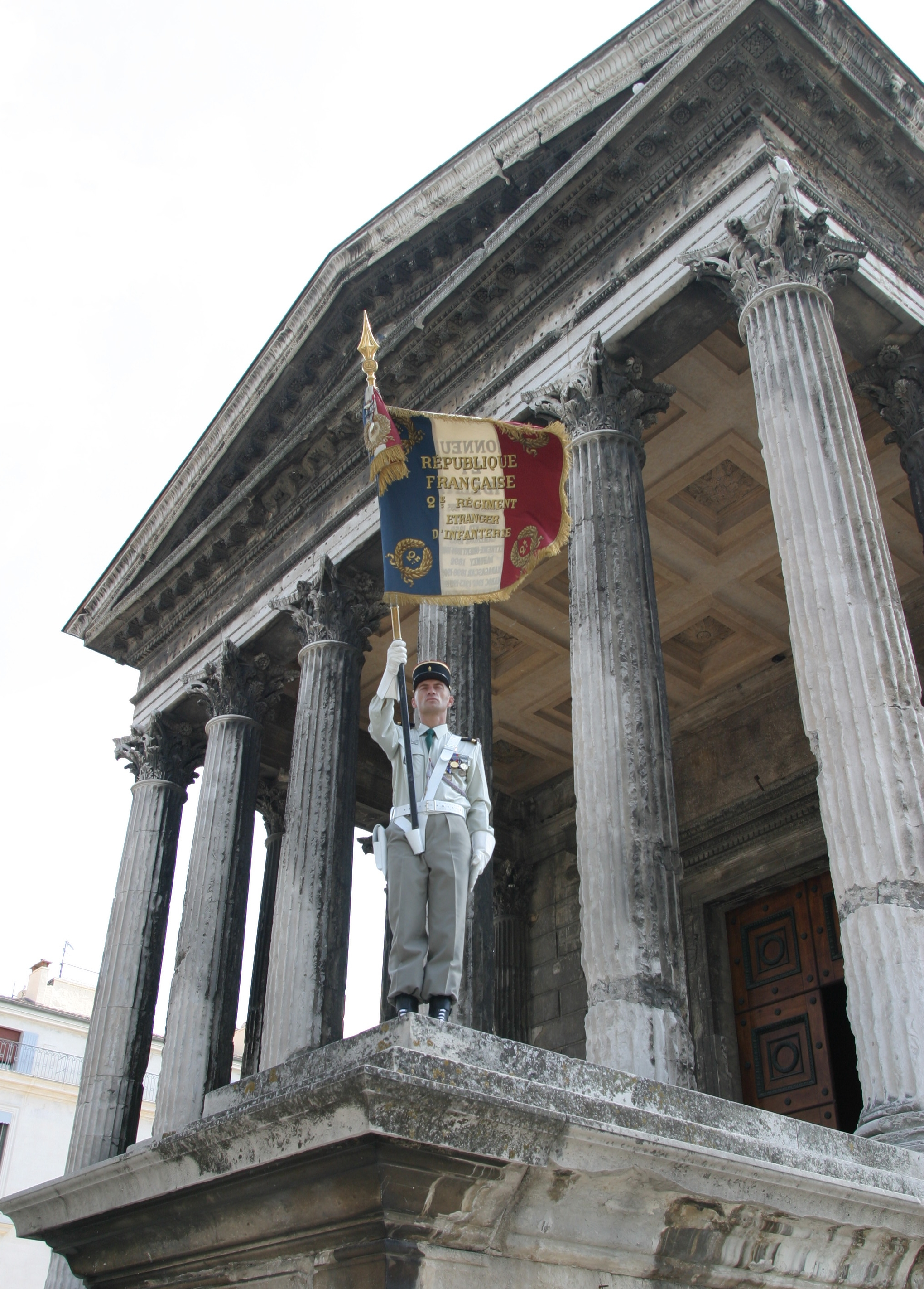 Drapeau du 2e Régiment étranger d'infanterie sur les murs de la Maison Carrée de Nîmes, France